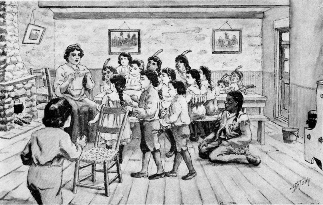 Madame Hébert enseignant le cathéchisme aux enfants sauvages